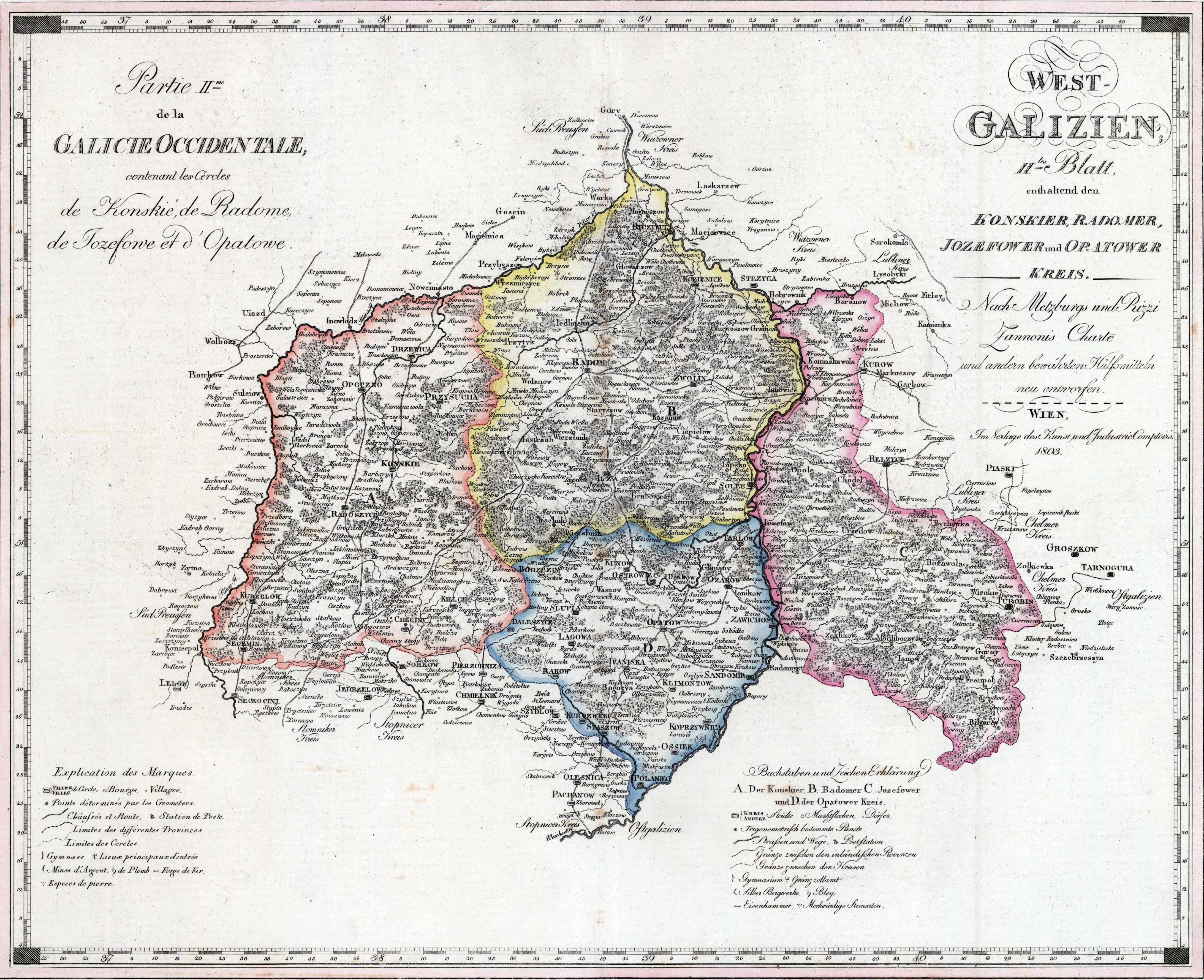 Mapa Nowej Galicji (Galicji Zachodniej) - karta nr 2 - cyrkuły: konecki, radomski, józefowski, opatowski Mapa ukazuje podział administracyjny według stanu na początek 1803 - przed reformą z maja 1803 r. Opis oryginalny: West-Galizien : nach Metzburg's und Rizzi Zannonis Charte und andern bewährten Hülfsmitteln neu entworfen. 2.tes Blatt, enthaltend den Konskier, Radomer, Jozefower und Opatower Kreis. [1]